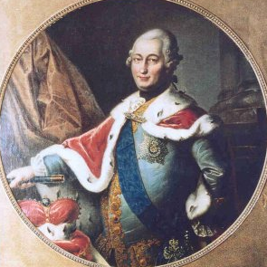 Peter Biron, gestorven in 1800